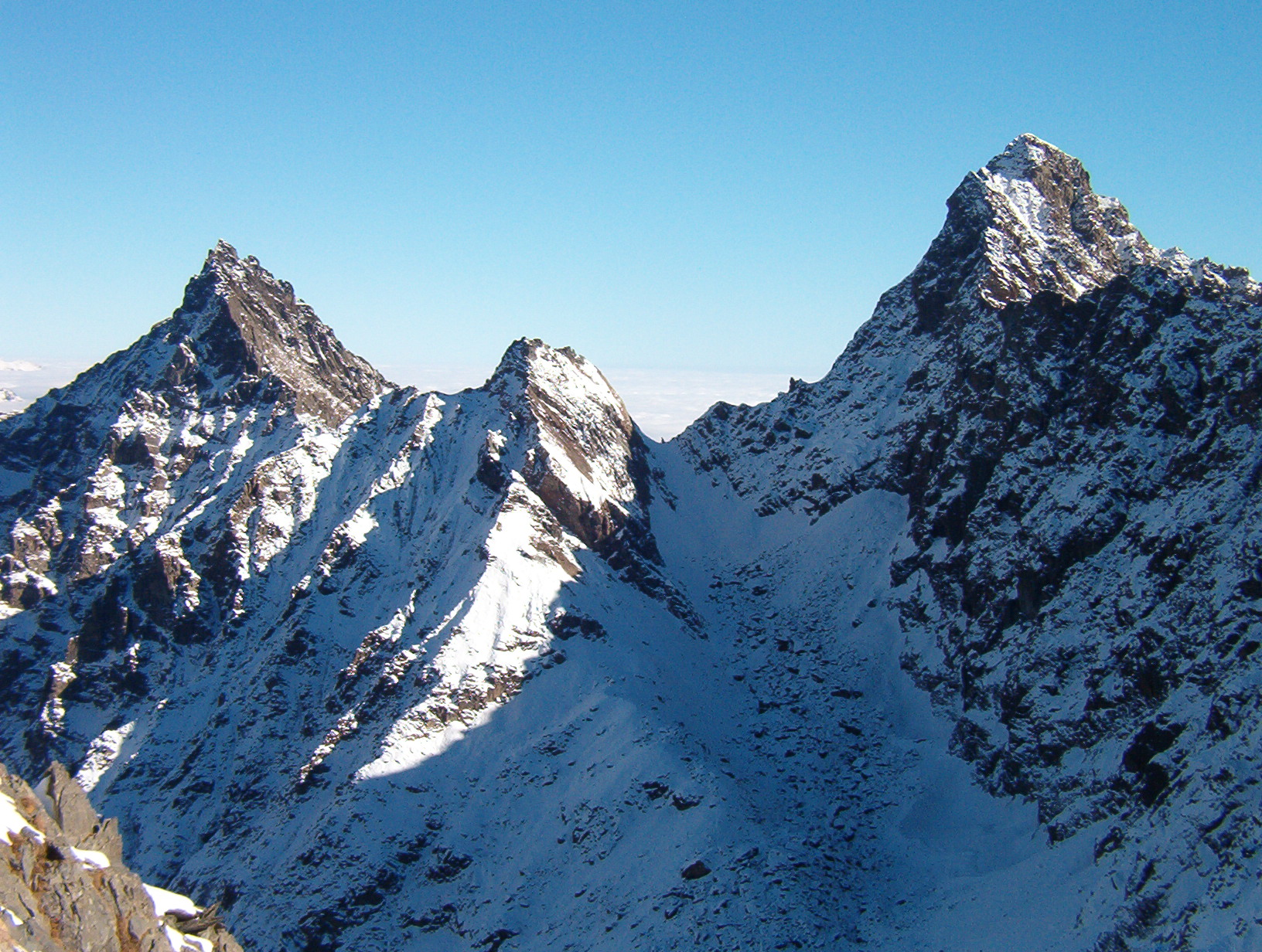 Uia di Mondrone - Alpi Graie - Piemonte - Italy